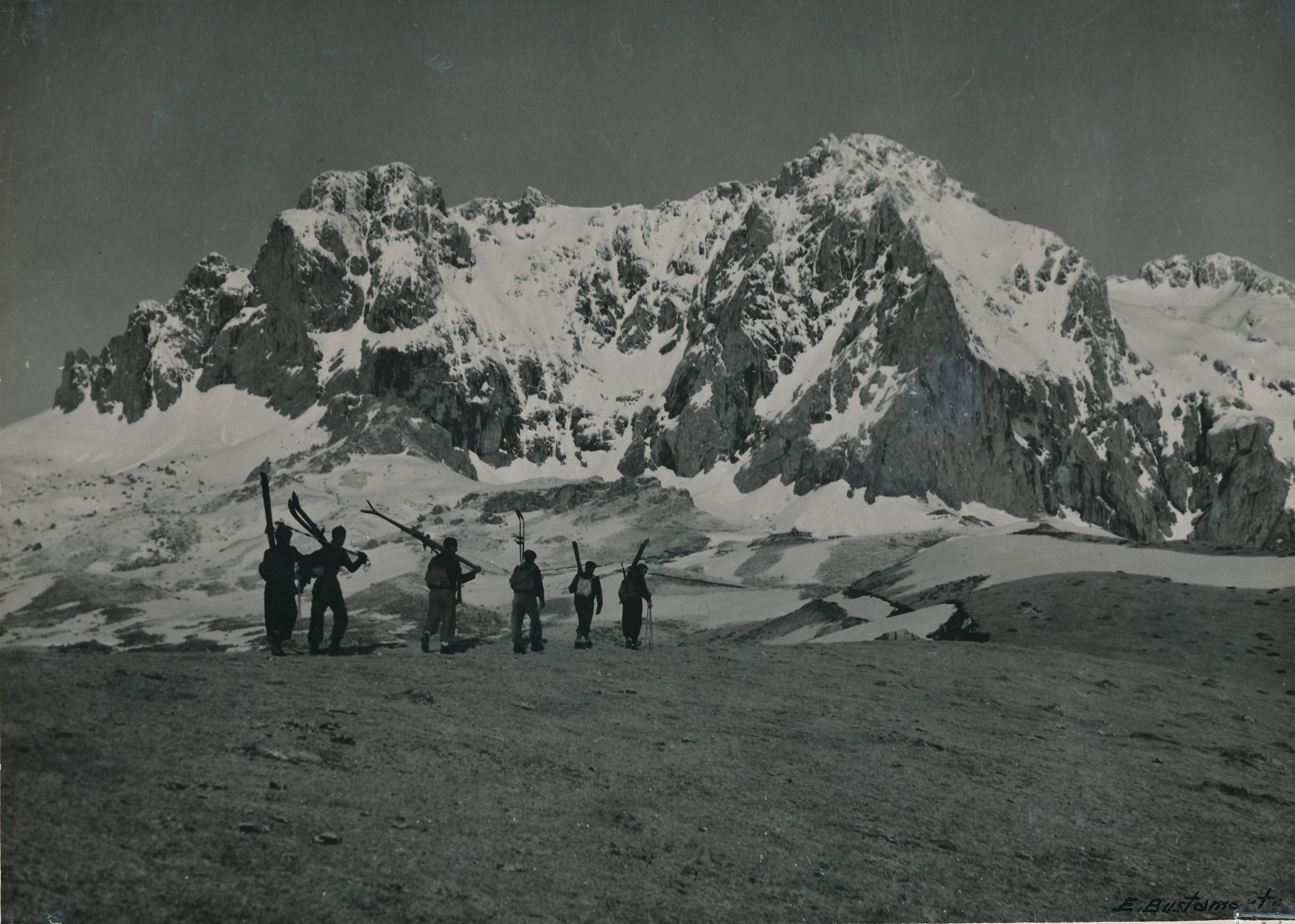 Peña Vieja y refugio de la Dirección General del Turismo en Áliva. Picos de Europa (Santander/Cantabria), diciembre 1943 Procedencia: Archivo Fotográfico de la Dirección General de Turismo (1951-1992) Fotógrafo: Bustamante Registro nº: 00036 Signatura: Caja 1 Fondos: Biblioteca de la Facultad de Empresa y Gestión Pública (Universidad de Zaragoza) Legado: Luis Fernández Fuster / E.S. Turismo Huesca